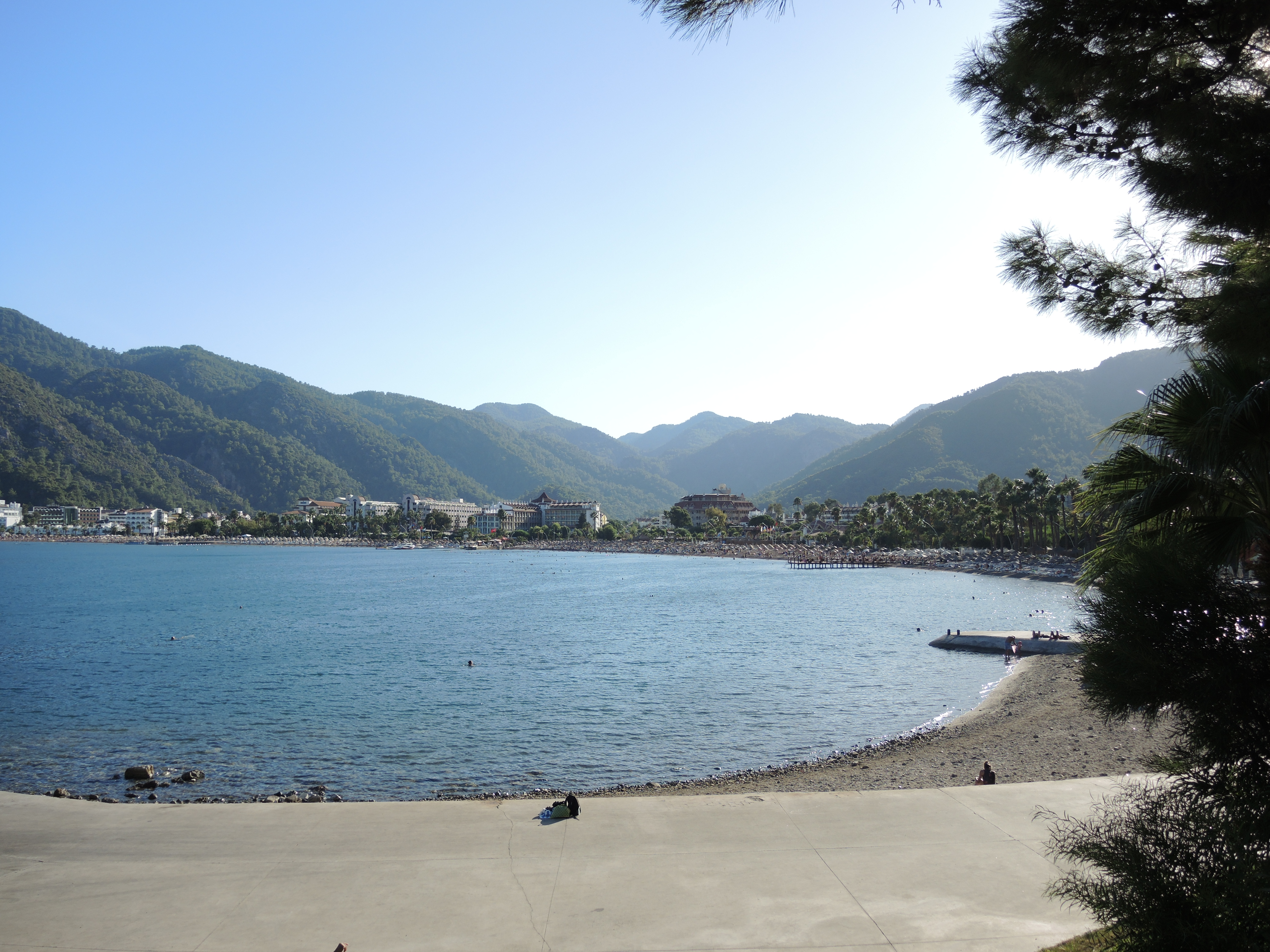 Побережье Ичмелера со смотровой площадки. Снято на Nikon Coolpix P7700